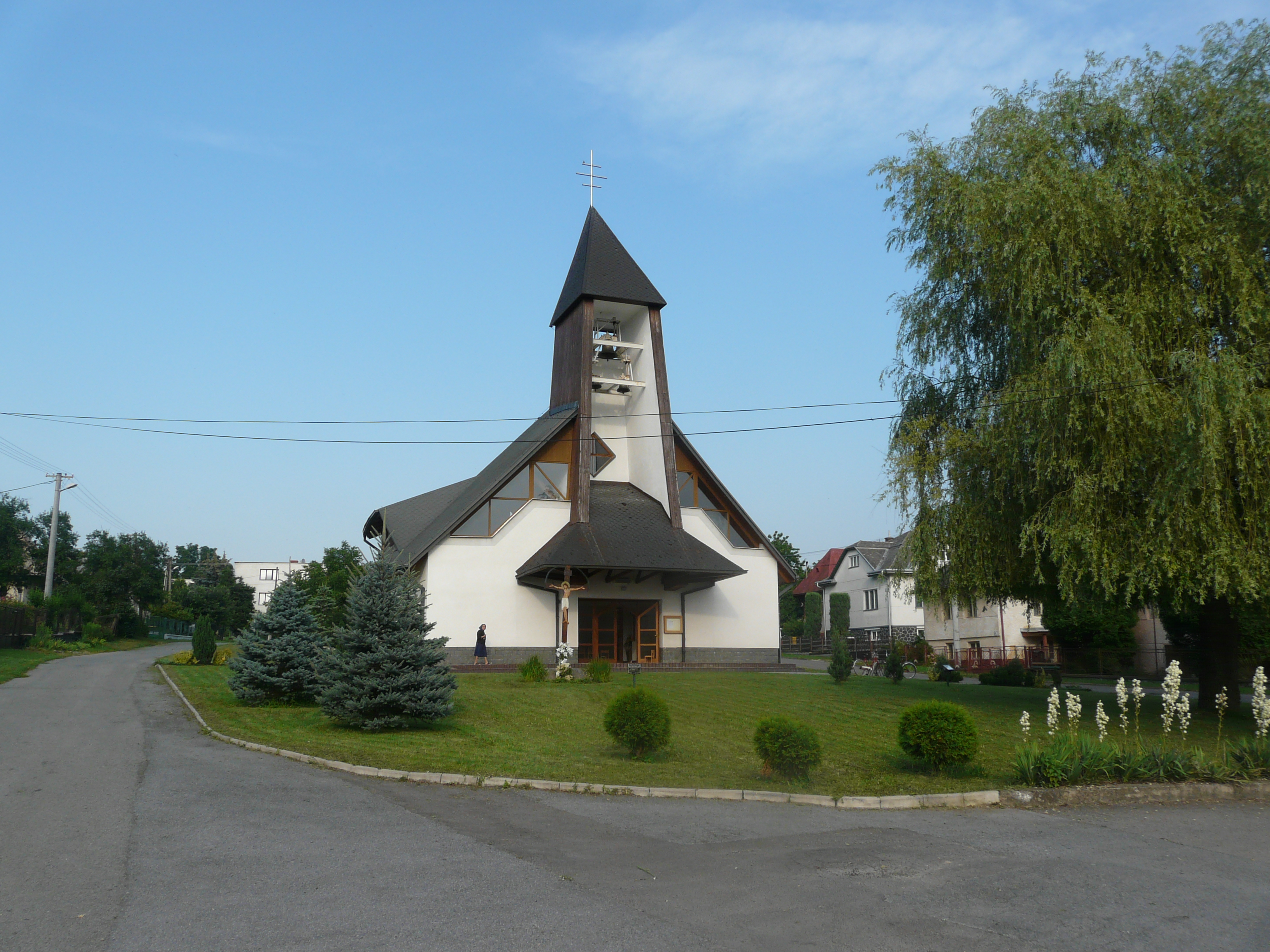 Pohľad na novú gréckokatolícku cerkev v Poši.